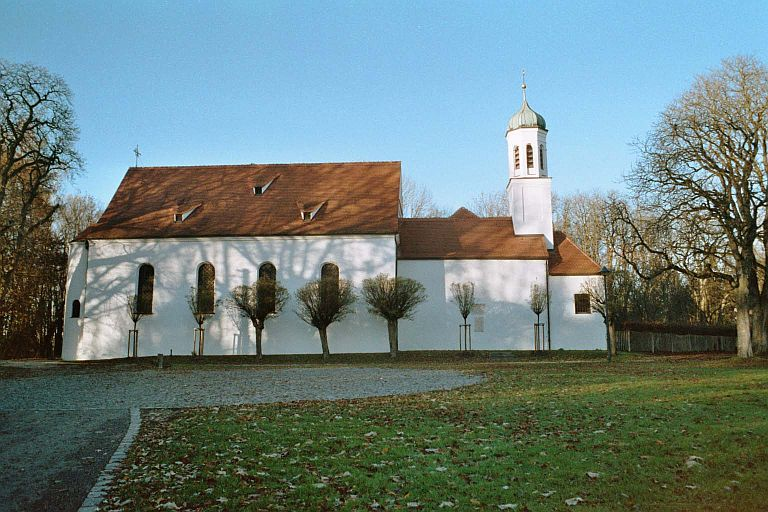 Die Wallfahrtskirche St. Maria von Loreto auf dem Kobel in Westheim (Neusäß) This is a photograph of an architectural monument.